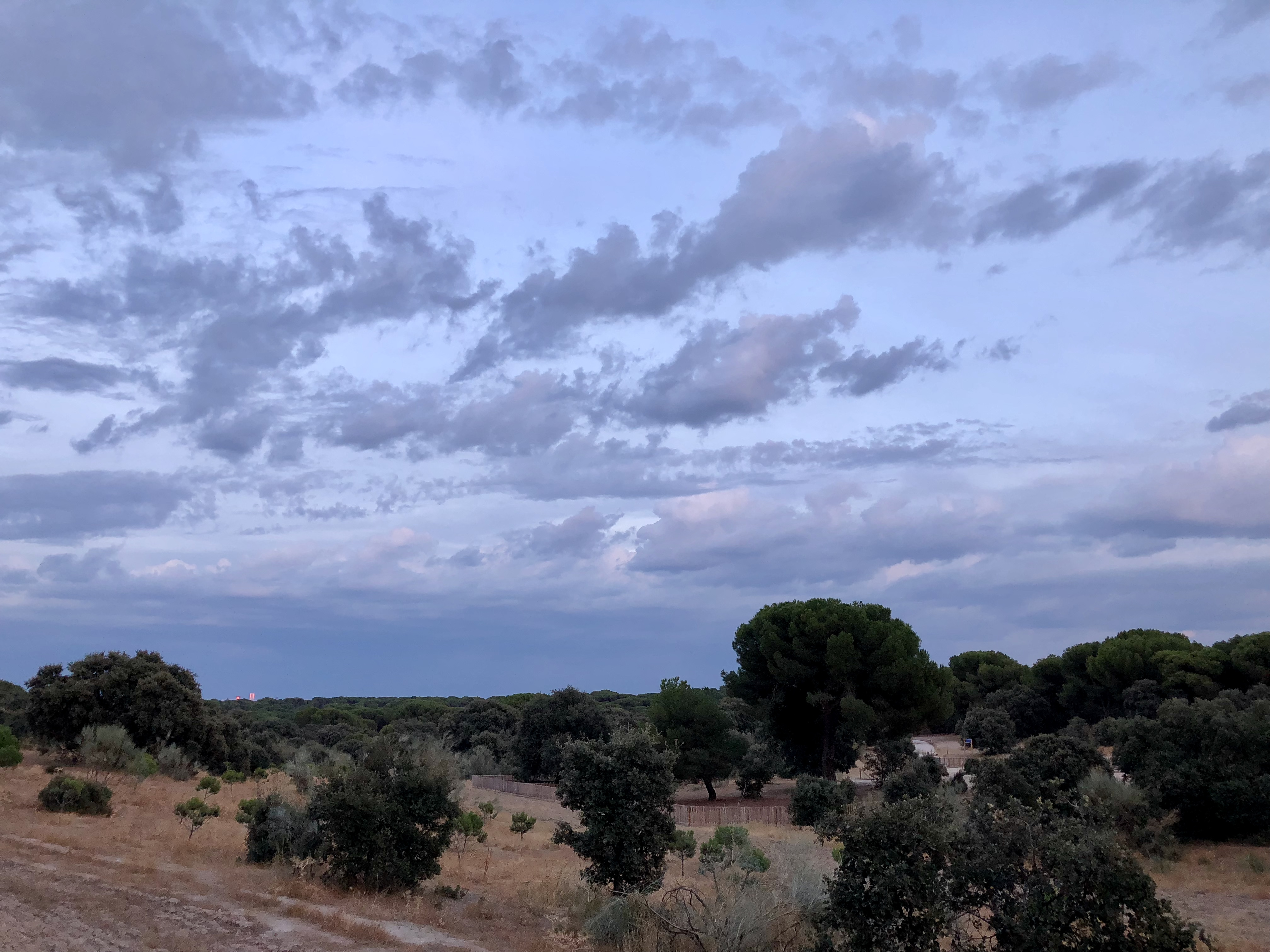 Monte del Pilar. Majadahonda, Madrid, España